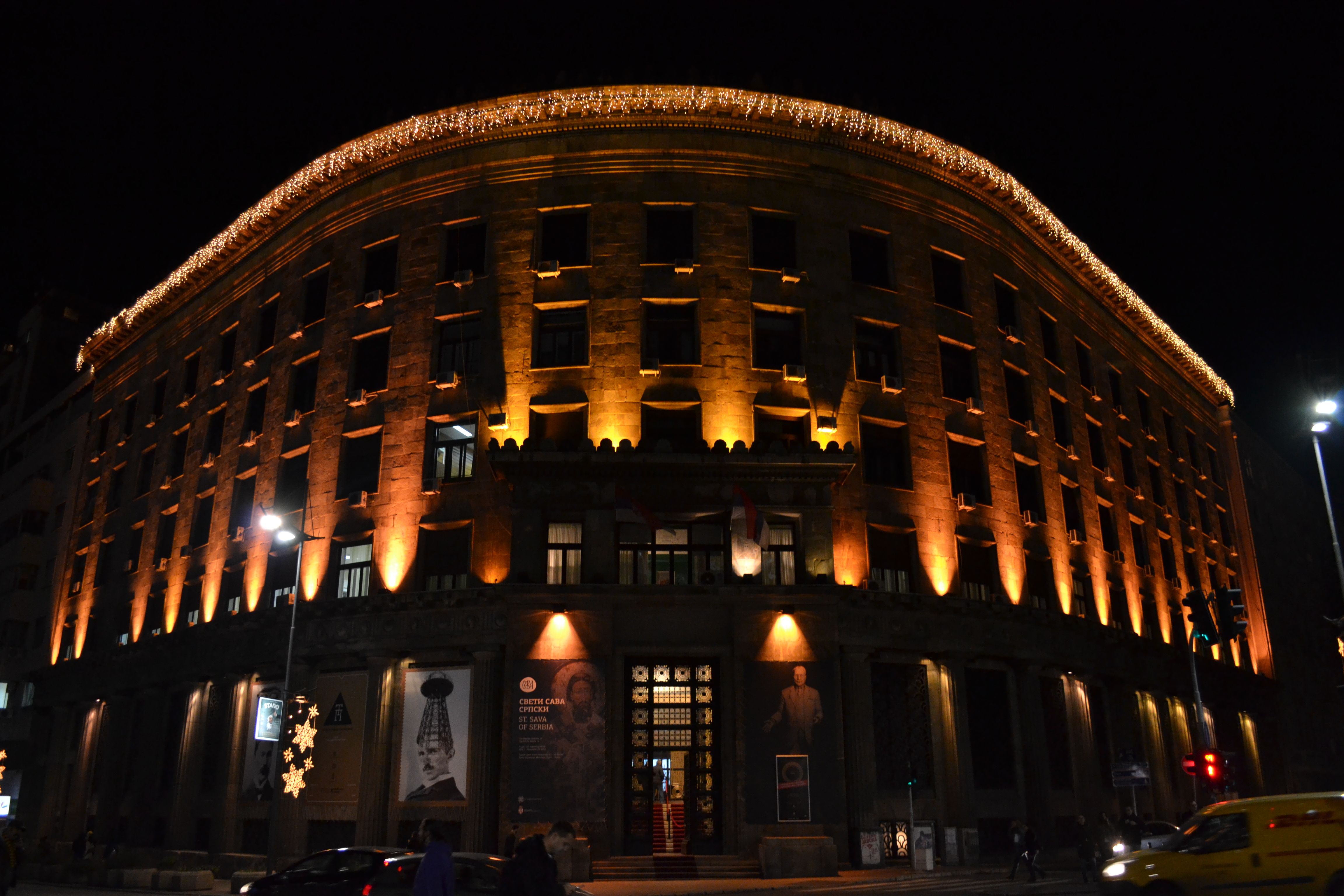 Kultur